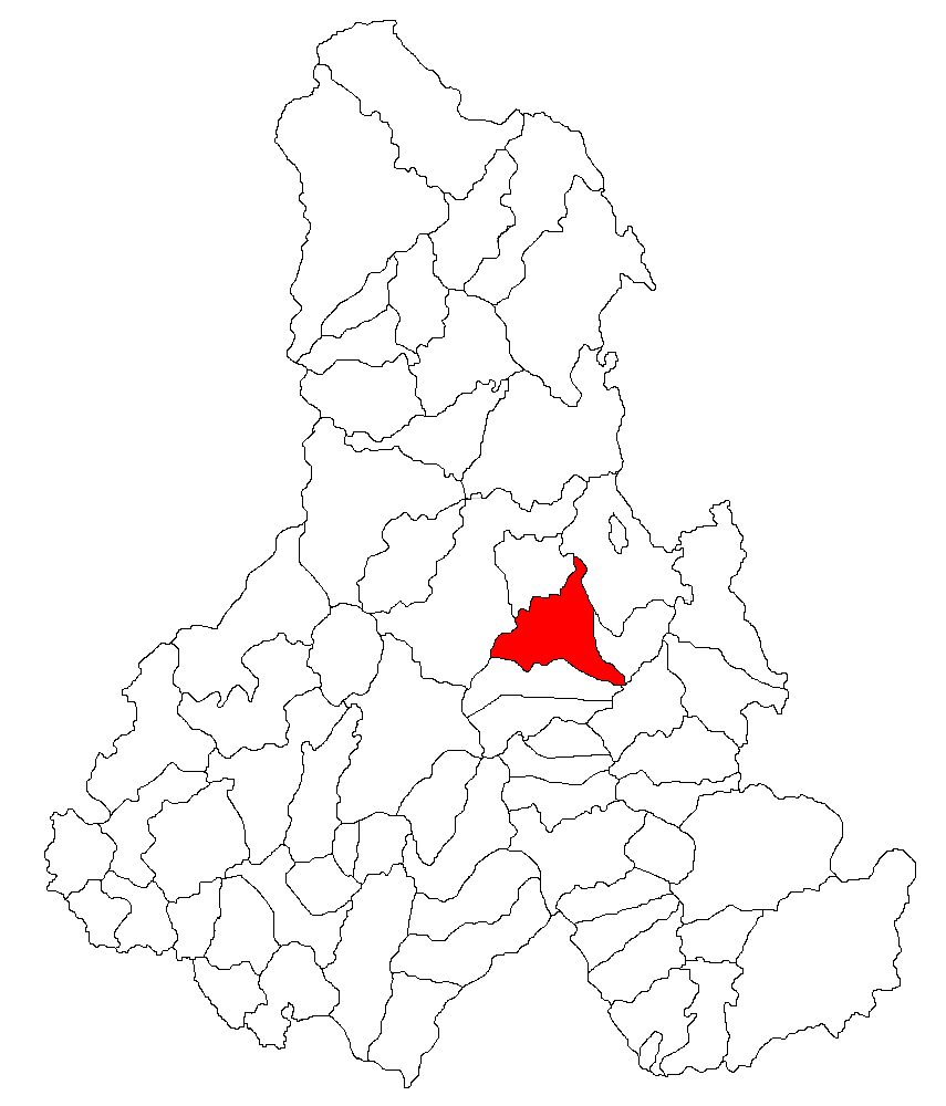 Categorie:Hărţi ale judeţului Harghita Contents 1 Licensing 2 Sursă 3 Licensing 4 Original upload log Licensing Sursă ro::Imagine:Harta_jud_Harghita.png